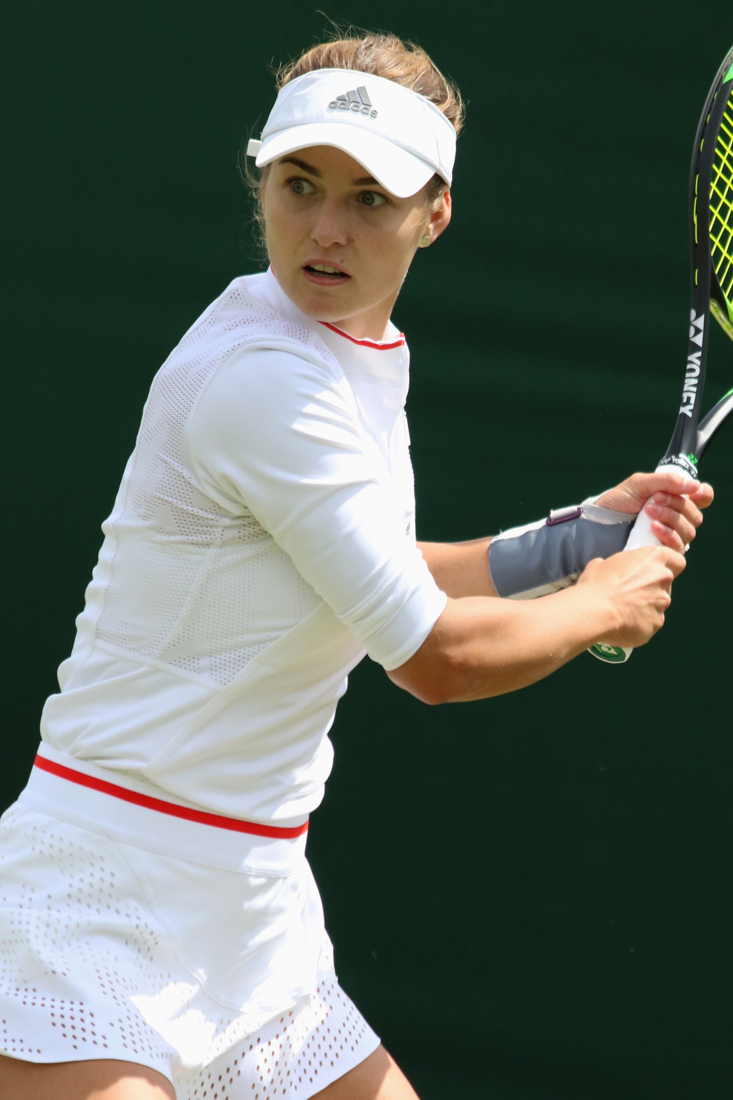 Kalinskaya WM19 (11)